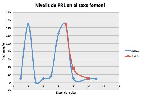 Canvis de la concentració de prolactina sèrica en la dona des de la concepció fins a l'edat adulta a través del naixement , la infància , la pubertat i l'embaràs . 1. Deu setmanes de gestació . 2. Naixement . 3. Tres mesos de vida . 4. Pubertat . 5. Començament de l'embaràs . 6. Sis mesos d'embaràs . 7. Part . 8. Un mes postpart . 9. Anys amb menstruacions . 10. Menopausa . ( La sèrie 2, línia vermella , correspon a una dona que alleti el seu fill , mentre que la sèrie 1 descriu el contrari ) .